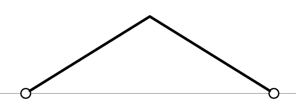 Треугольная арка